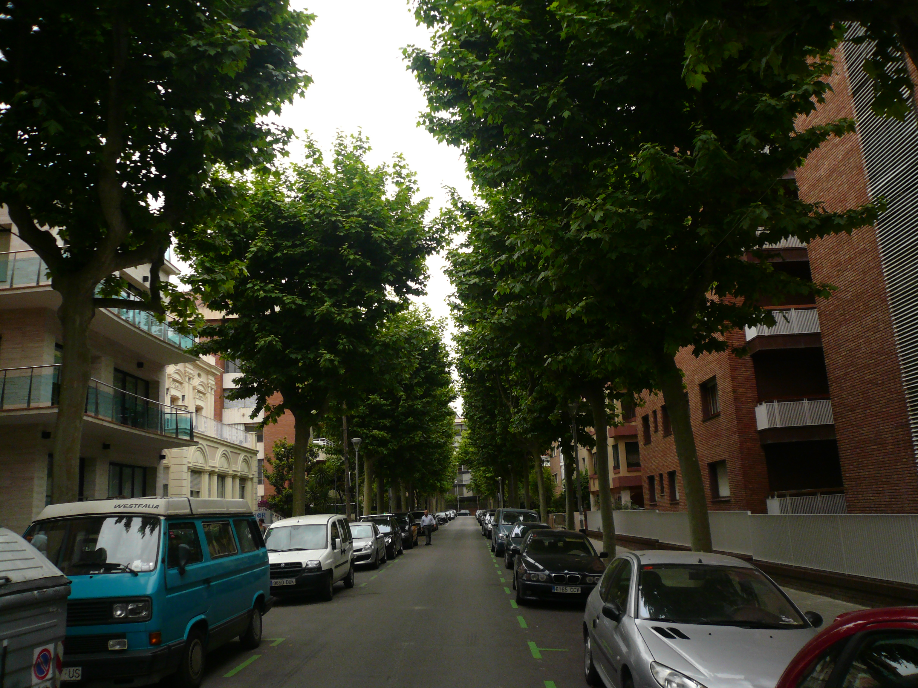 Un carrer al barri de les Tres Torres, a Barcelona.